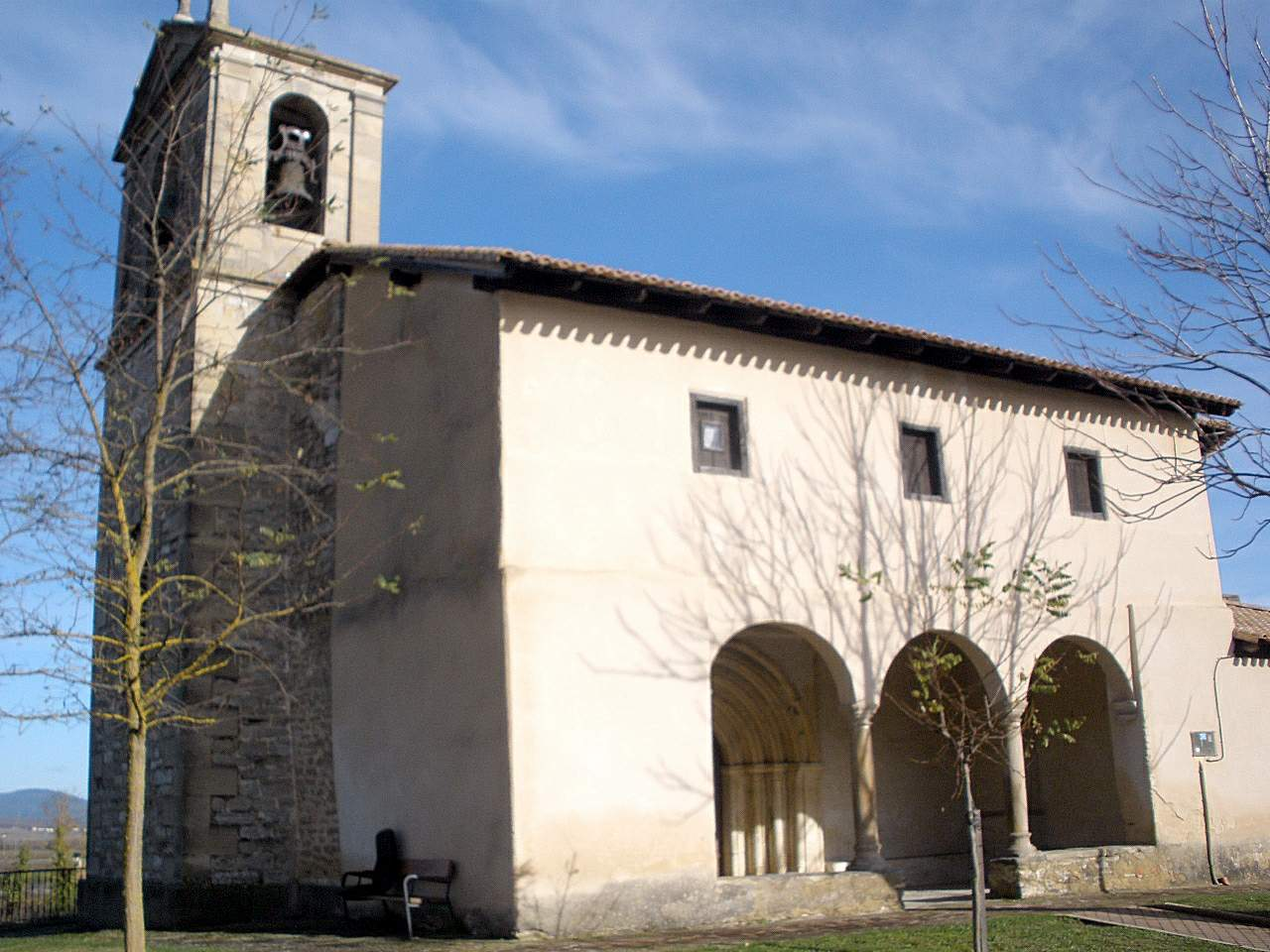 Zerio (Álava). Iglesia de Santiago Apóstol